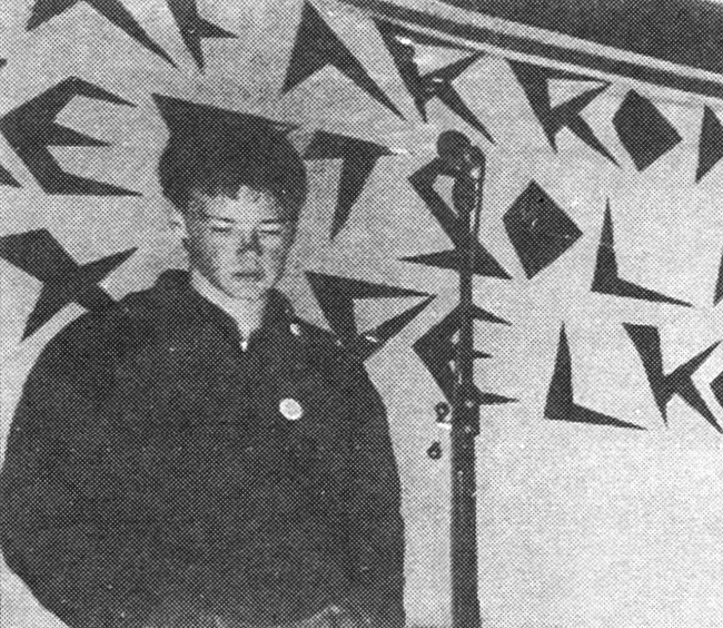 Nafarroako bertsolarien 17. txapelketa. Iruña 1988